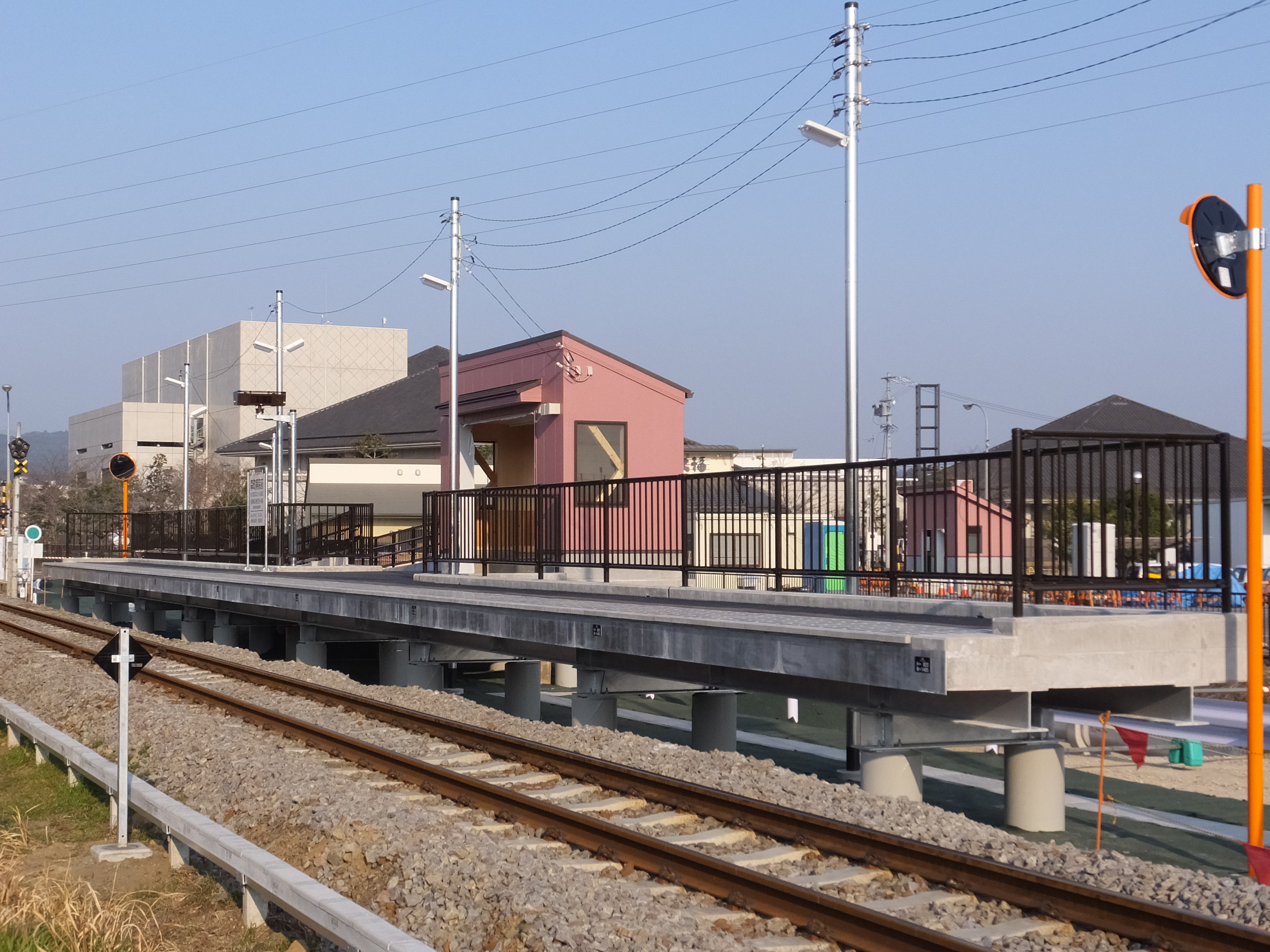 天竜浜名湖鉄道 森町病院前駅